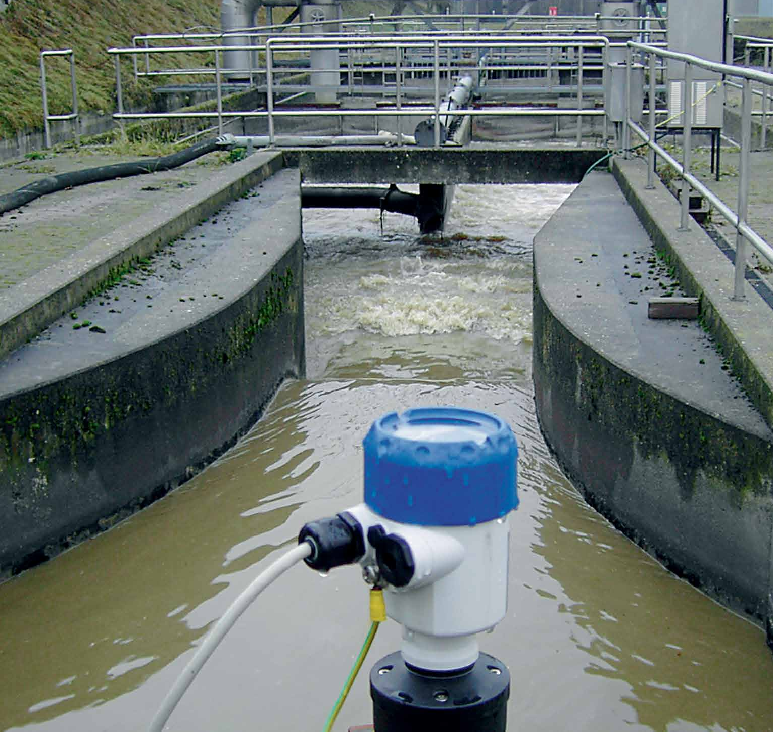 Ультразвуковой расходомер в эксплуатации